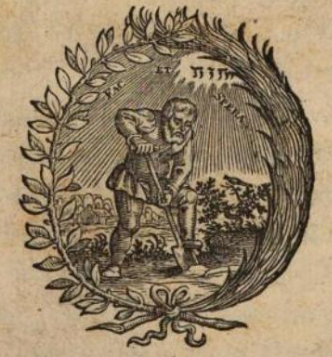 Image extraite du frontispice de " Responsio Ad Additivncvlam D. Ioannis Kepleri" de Martinus Hortensius, 1631.